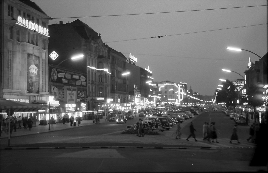 Kurfürstendamm ab dem Breitscheidplatz in Berlin-Charlottenburg.